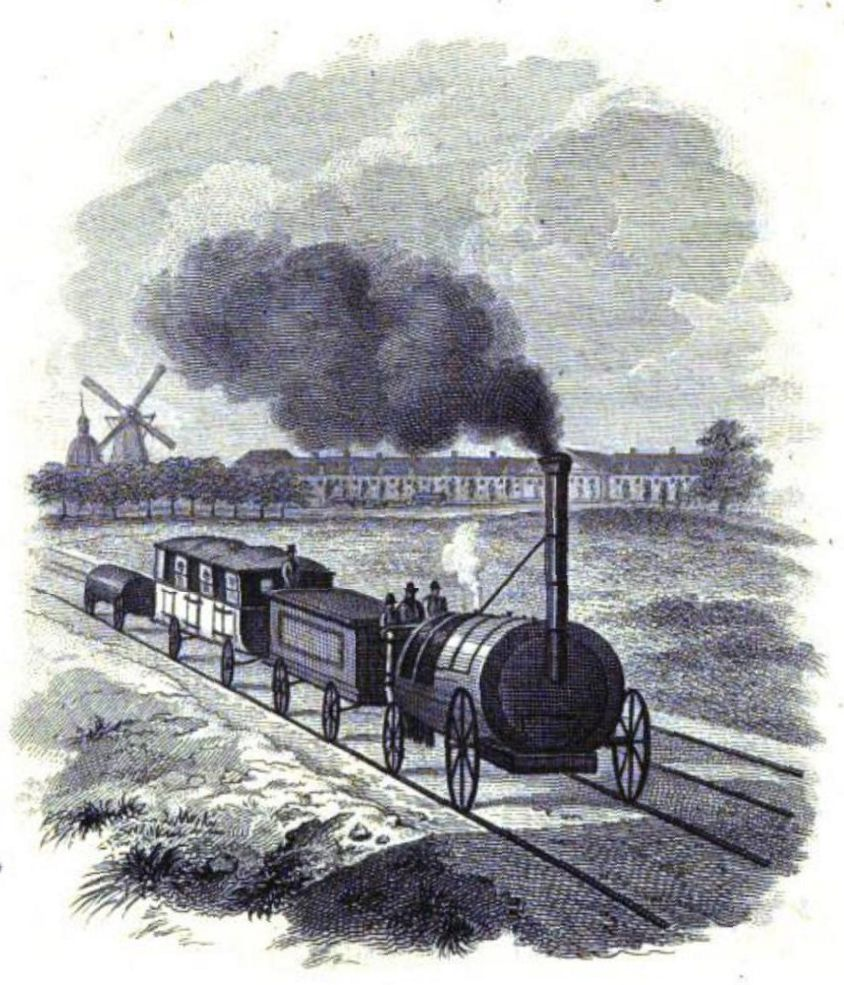 Impressie van de te realiseren spoorweg.